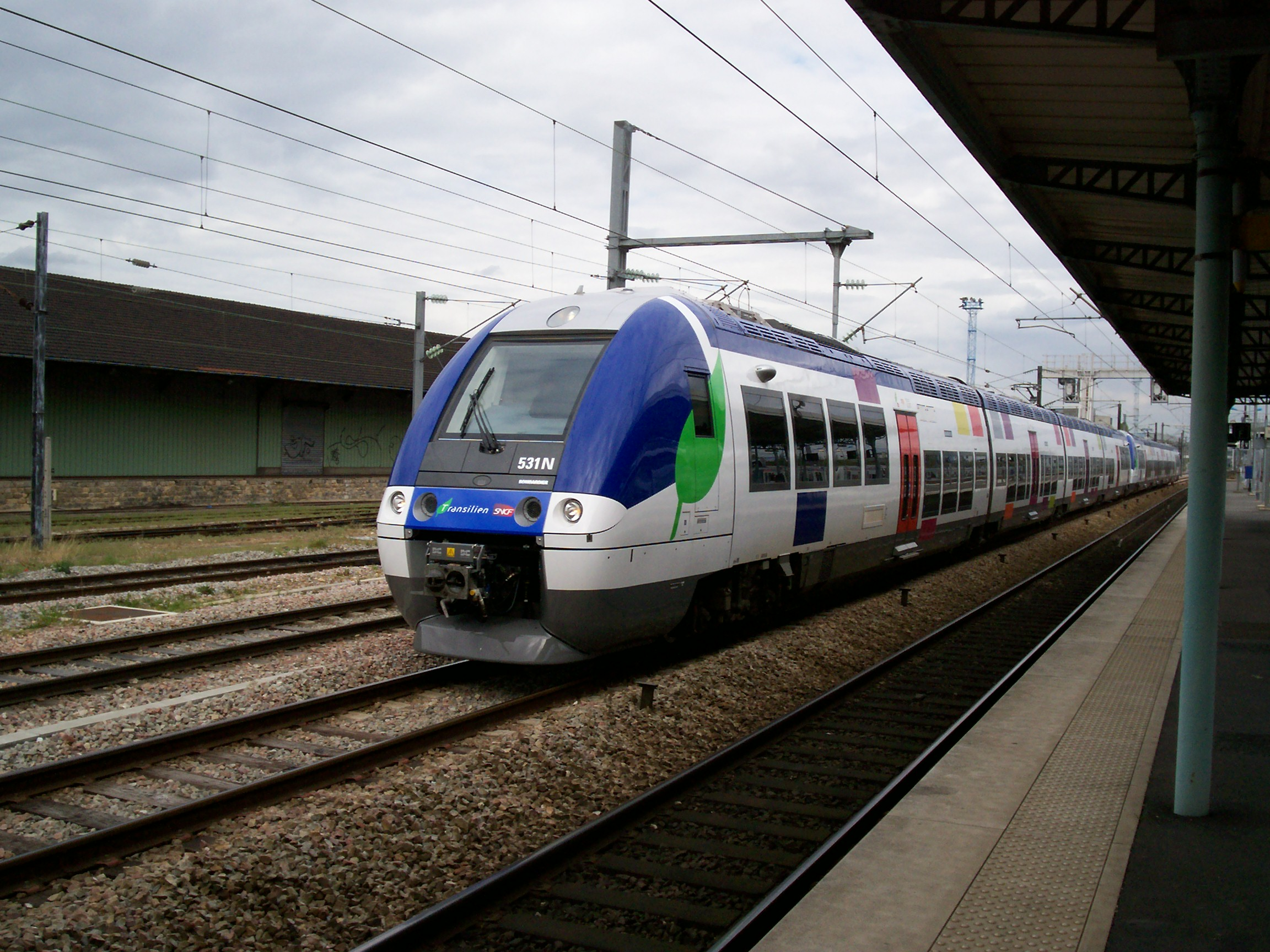 B82500 Transilien à Pantin